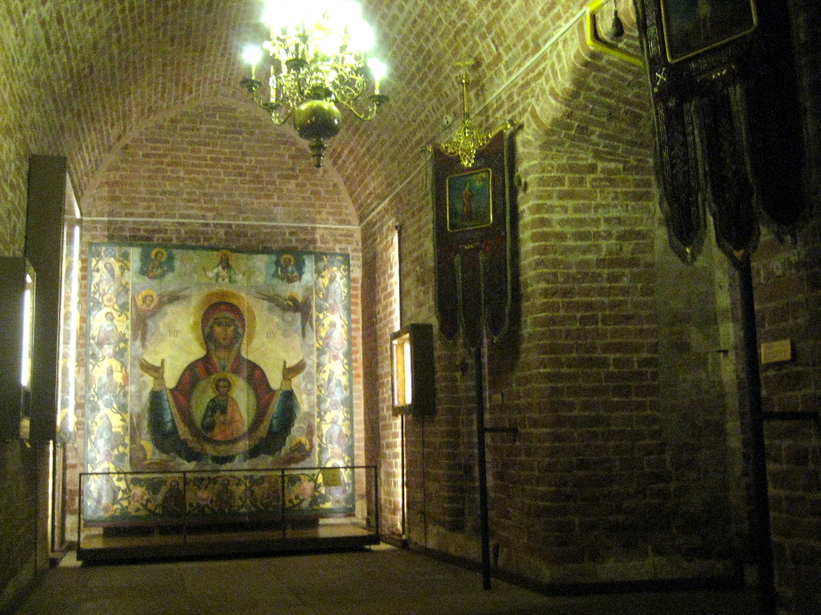 Богоматерь Знамение. 1780-е. В 18-19 вв. находилась над входом в придел св. Василия Блаженного Реплика фасадной иконы, расположенной на восточной стене собора. Левый ряд (сверху вниз): Василий Великий, Иоанн Златоуст, св. Петр, св. Иона Правый ряд (сверху вниз): Григорий Богослов, Николай Чудотворец, св. Алексей, св. Филипп Нижний ряд (слева направо): Стефан Мученик, Варлаам Хутынский, Василий Блаженный, Сергий Радонежский